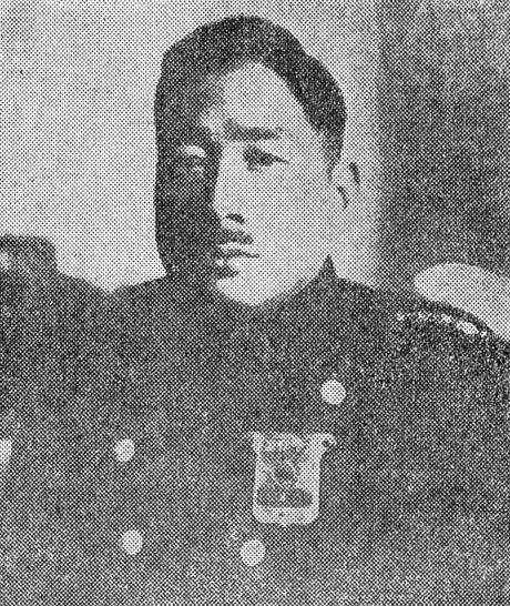 1946년 ko:1월의 창랑 장택상 수도총감